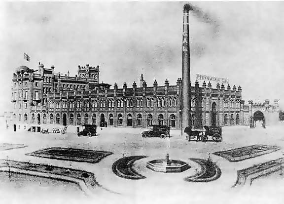 Vista general de la antigua fábrica de la Perfumería Gal. Esta factoría estuvo situada en la zona de Moncloa, en Madrid (España). Fue construida entre 1913 y 1915 por el arquitecto riojano Amós Salvador y Carreras, en sustitución de un establecimiento anterior, situado en la calle de Ferraz, que, a su vez, reemplazó a un primitivo comercio de la calle del Arenal. Fue ampliada entre 1918 y 1919. Desapareció en los años 1960. Sobre su solar se levanta hoy día el complejo Galaxia.